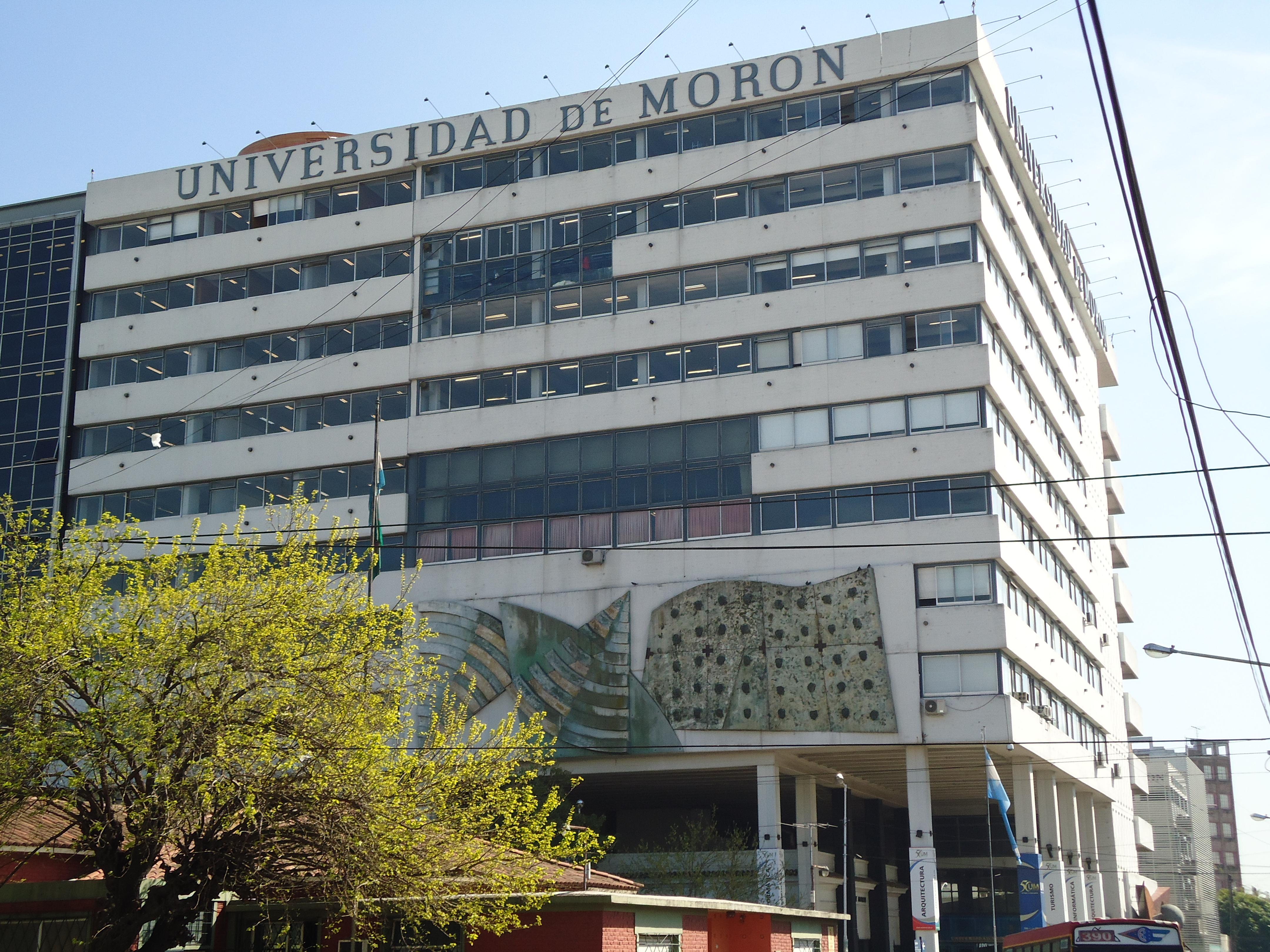 Universidad de Morón, Morón, Provincia de Buenos Aires, Argentina.